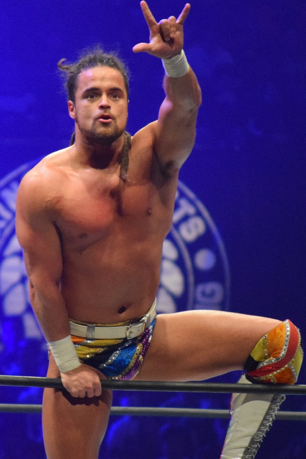 2017年2月11日 大阪府立体育会館 「THE NEW BEGINNING in OSAKA」 ジュース・ロビンソン